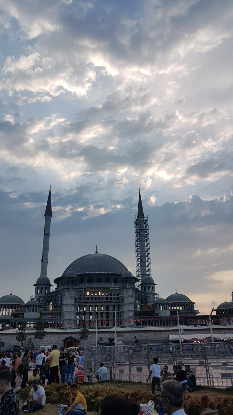 Taksim Camii inşaat halinde.